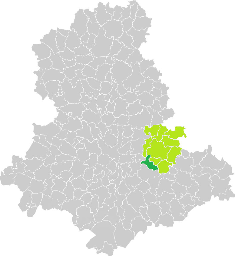 Carte de situation de la commune de la Geneytouse (en vert foncé) dans le votre Canton (en vert clair) sur une carte des communes de la Haute-Vienne